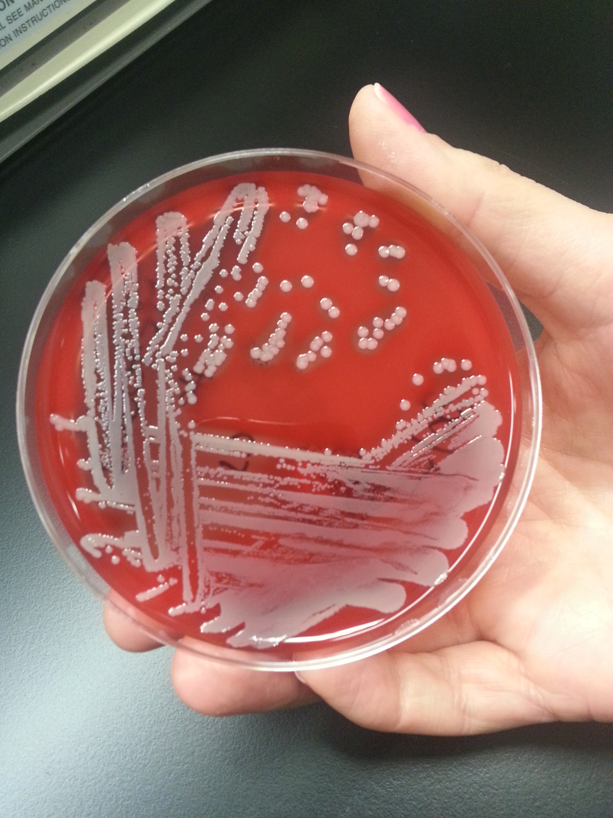 lab culture